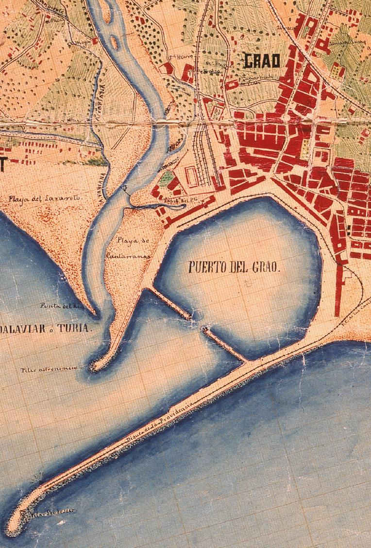 El Grau el 1883 (el nord està a la dreta).